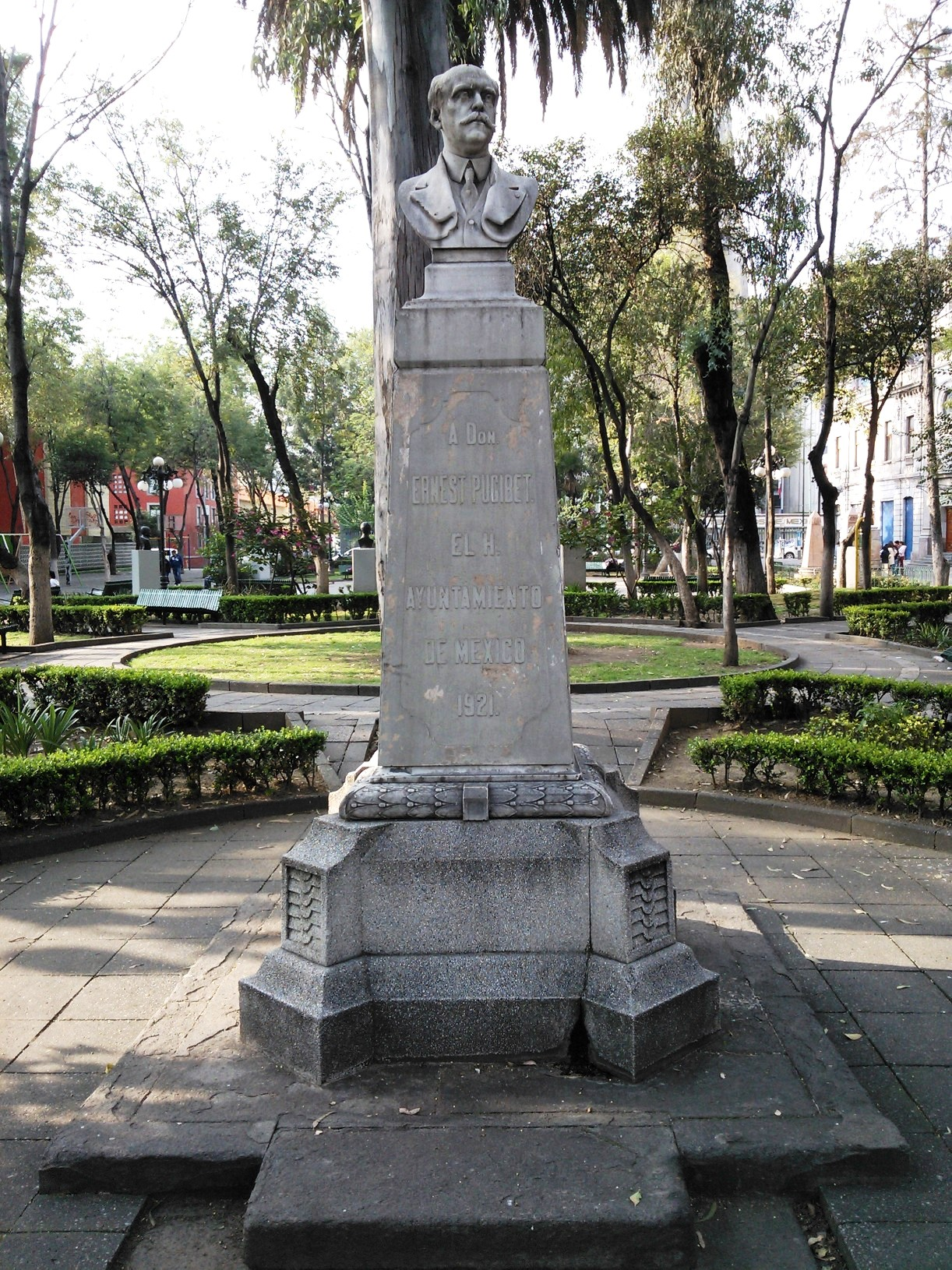 Monumento a Ernesto Pugibet en la Ciudad de México